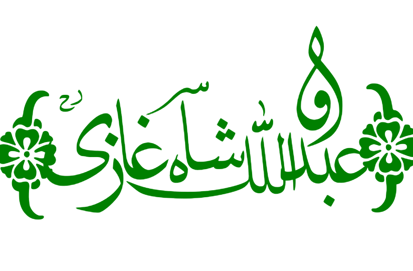 عبداللہ شاہ غازی خطاطی نام